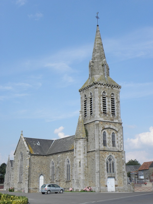 Église paroissiale Saint-Berthevin à Précey (50).